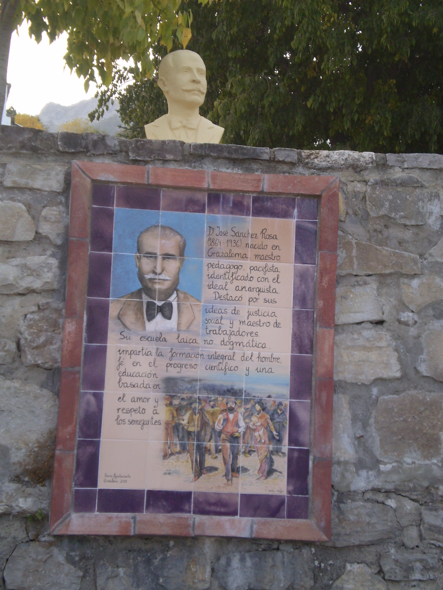 Busto y azulejo del maestro anarquista andaluz José Sánchez Rosa, en su pueblo natal, Grazalema. Está situado en la plaza de la Asamblea.